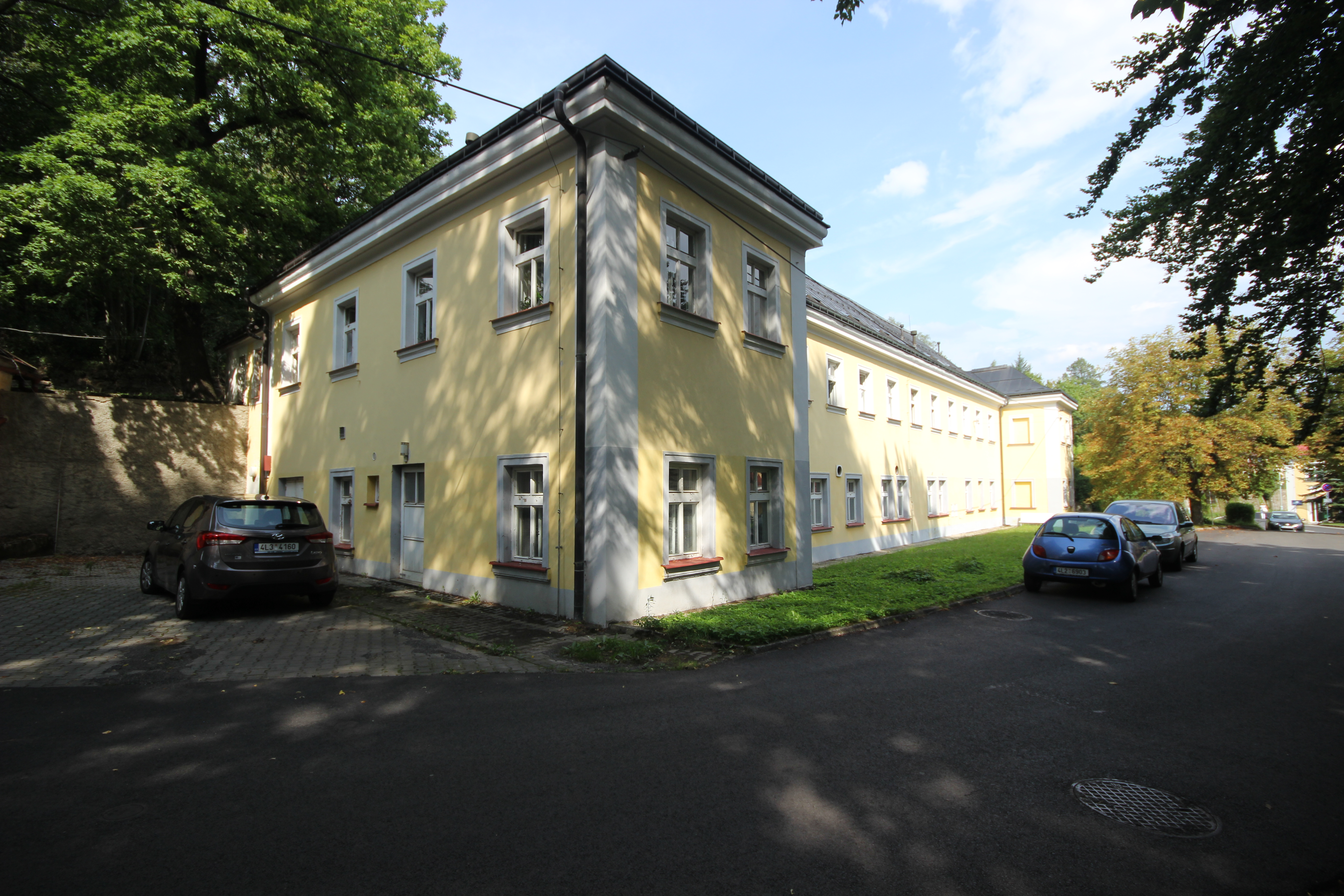 Objekt Vodoléčba v Lázních Libverdě. This photograph was taken with a DSLR from WMCZ's Camera grant.